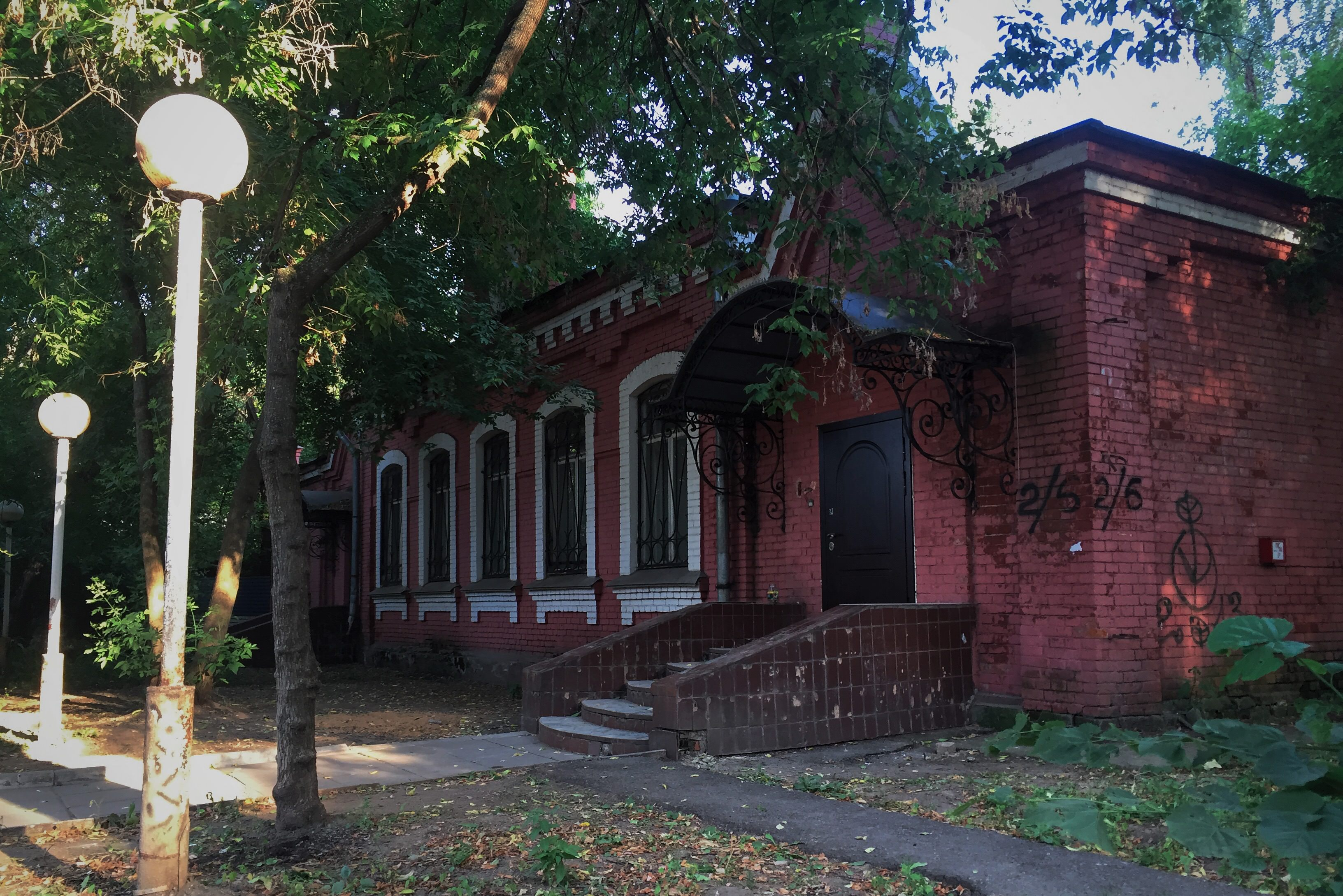 1-й Рижский переулок Moscow in 2016; Москва в 2016